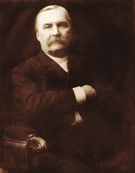 Фотопортрет Н. В. Лысенко